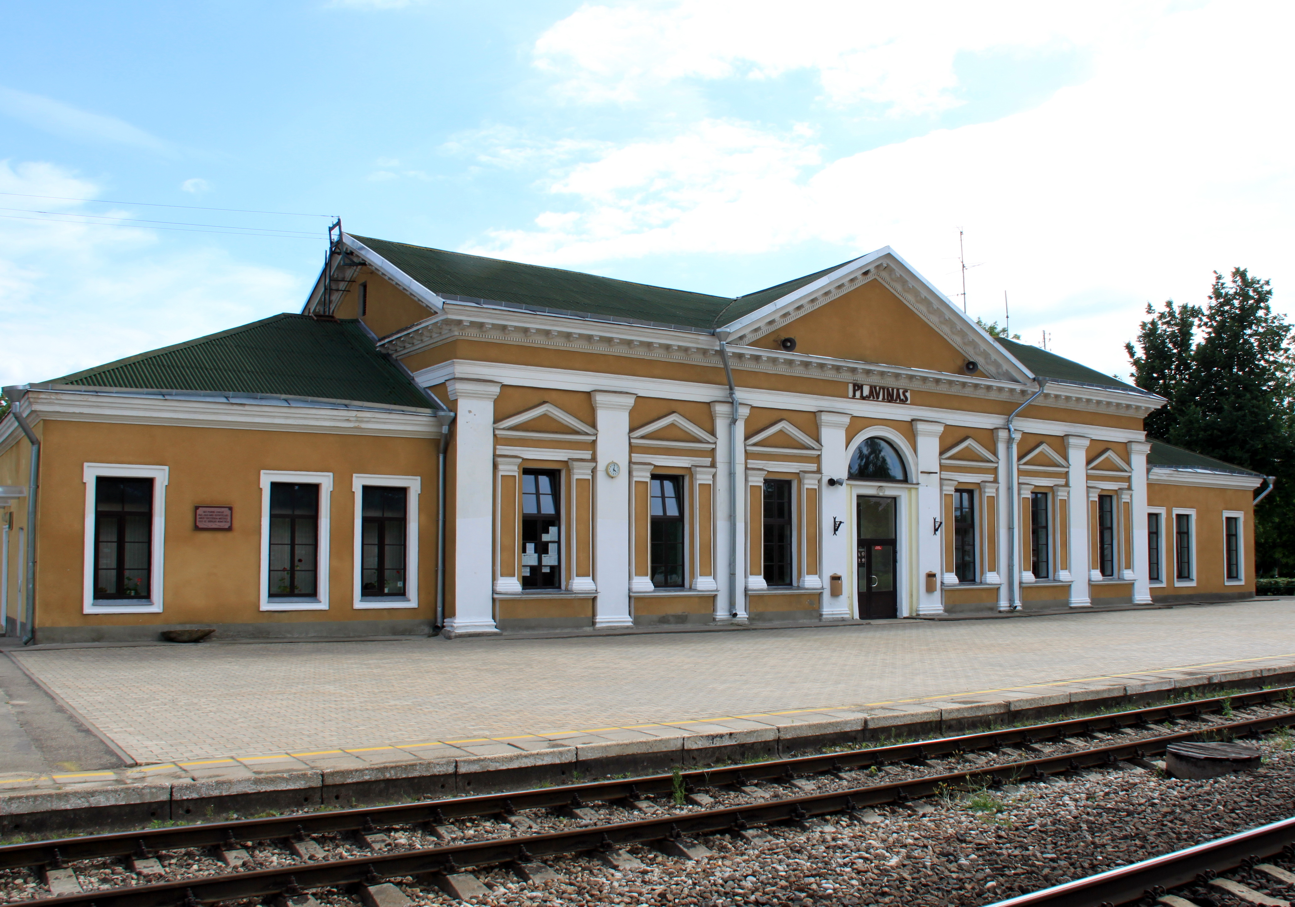 Pļaviņas